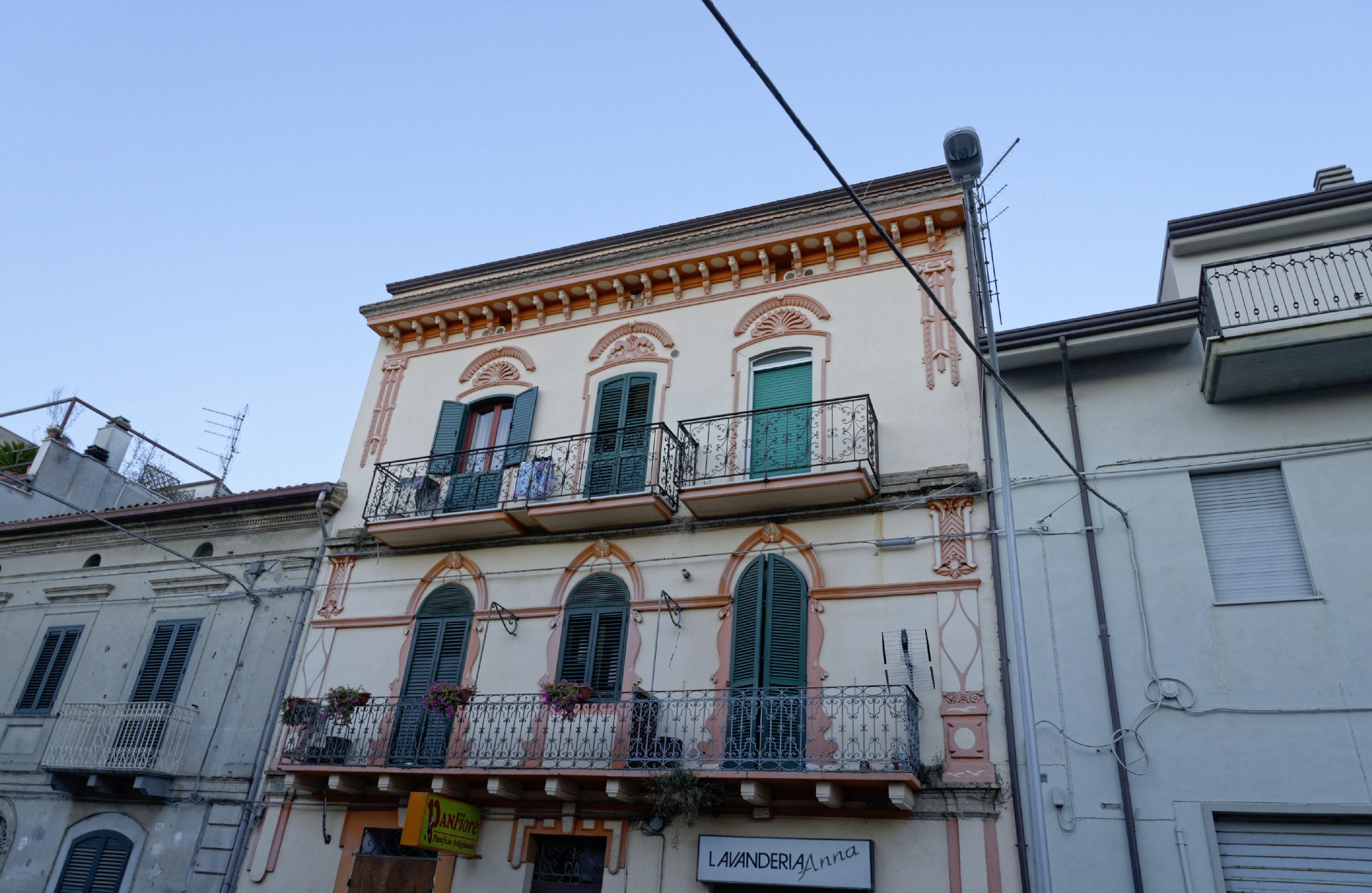 San Vito Chietino 2015 Dieses Foto entstand in Zusammenarbeit mit Stadtbesichtigungen.de Die Seiten Stadtbesichtigungen.de, der dazugehörige Reise Blog sowie die Facebookseite: Stadtbesichtigungen Rom dürfen dieses Bild für Ihre Veröffentlichungen ohne den Hinweis auf Wikipedia, Commons bzw der Lizenz verwenden. Die Verantwortlichen habe von mir (Ra Boe) die Originaldaten zur freien Verfügung übermittelt bekommen.